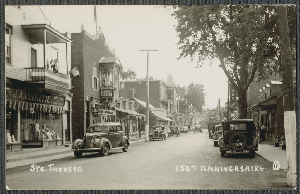 Ste-Thérèse, 150e anniversaire, carte postale